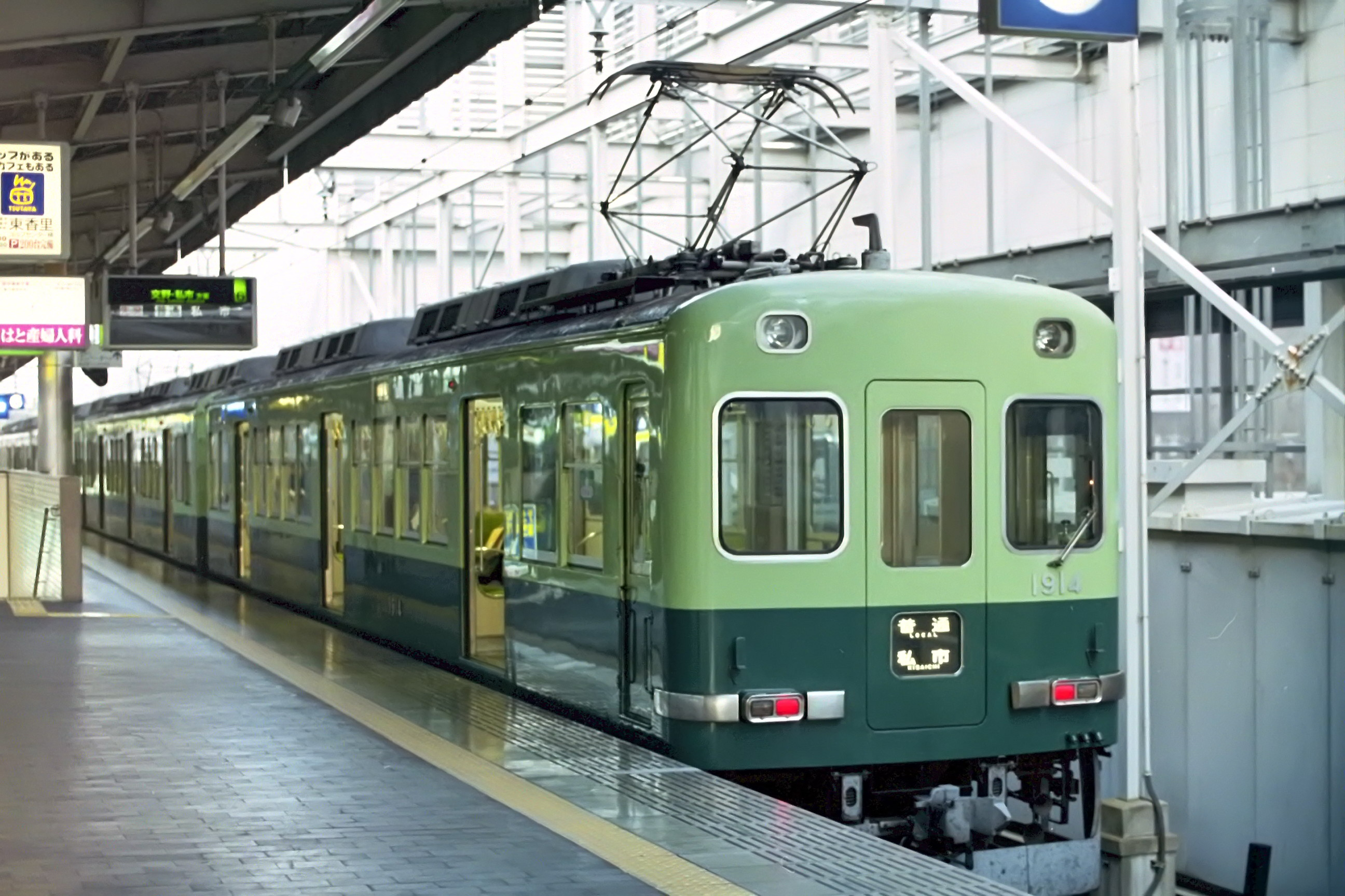 京阪電気鉄道1914